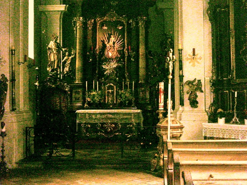 Church St. Anna, München Harlaching, Hochaltar mit Gnadenbild